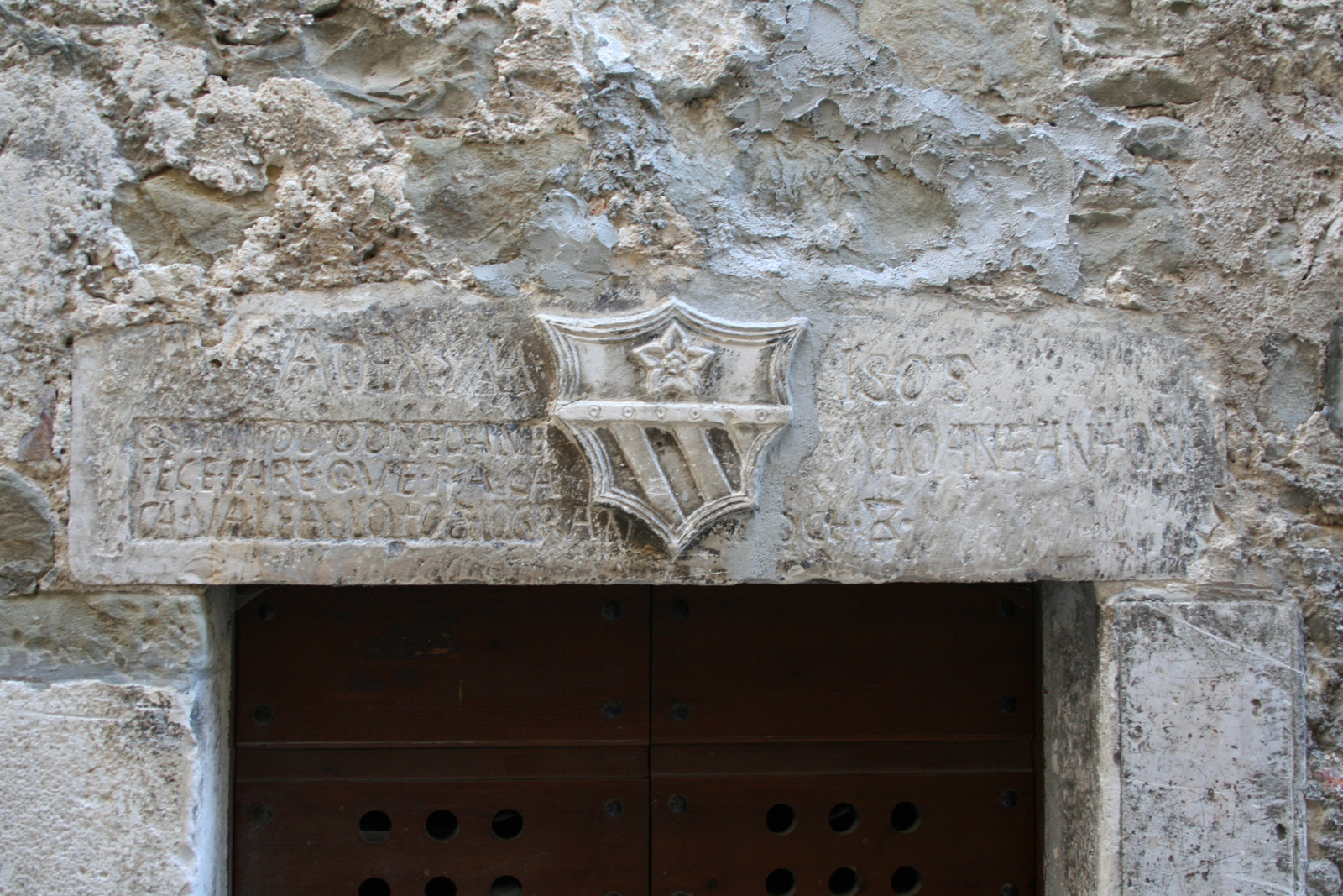 Pietracamela in provincia di Teramo, portale in pietra scolpito con inscrizione e stemma centrale. Interno del paese.